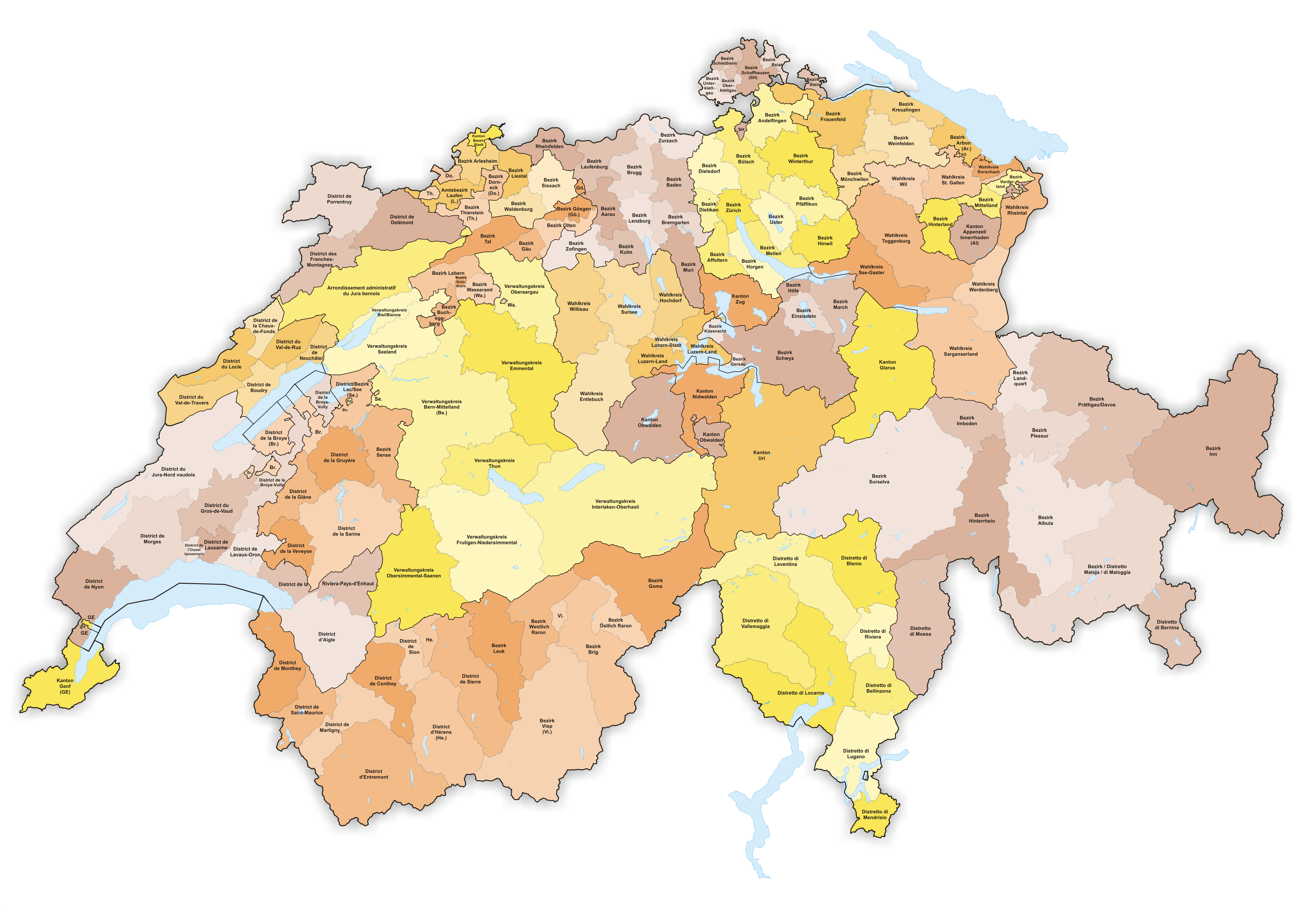 Districts in Switzerland